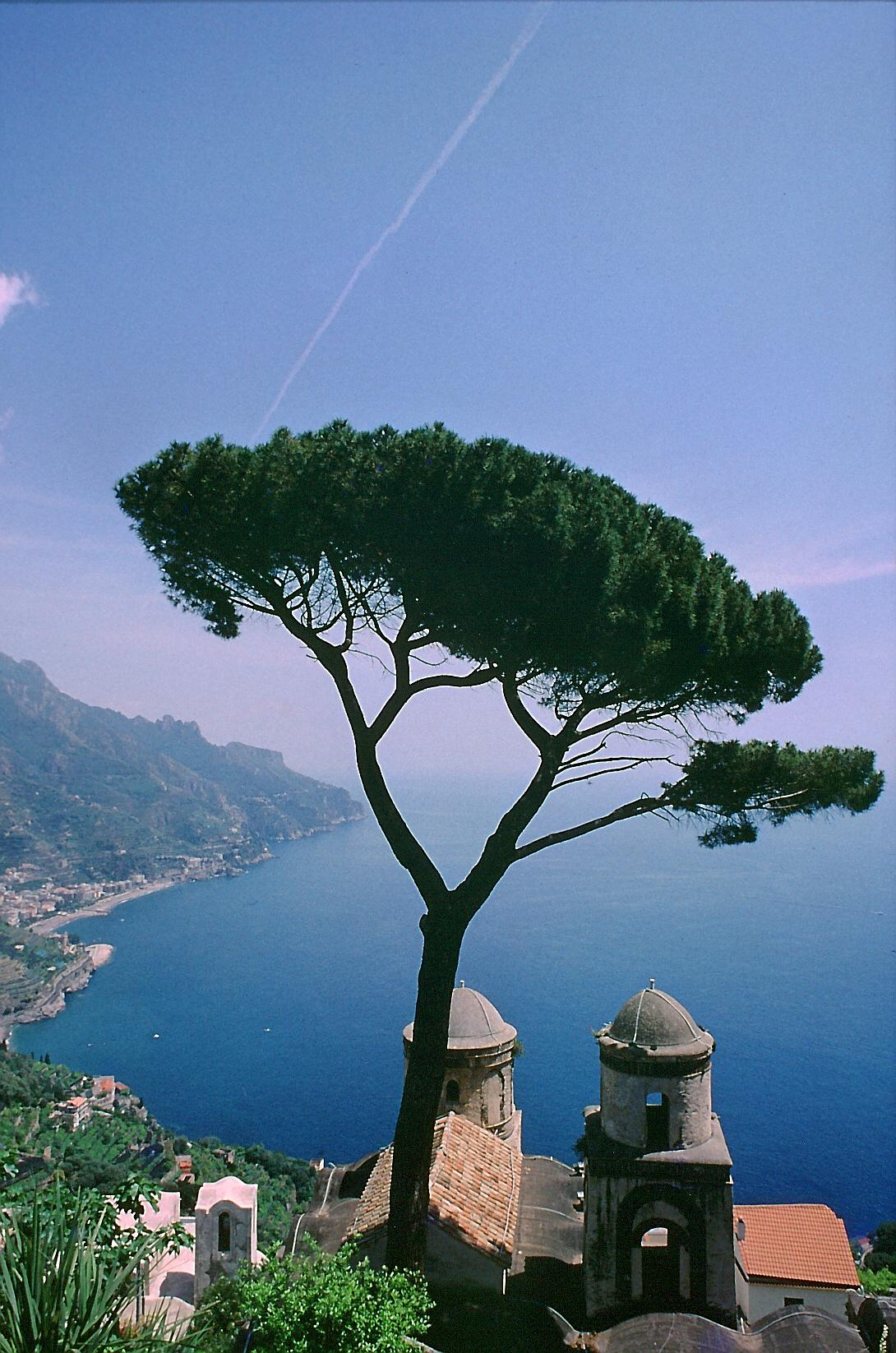 Vista, Ravello, Campania, Italia Description in de wikipedia Beschreibung: Blick von Ravello auf die amalfitanische Küste Fotografiert von Andreas Wahra am 16. Mai 2003 Lizenzstatus: Public Domain